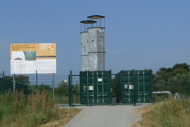 Freizeitpark Berlin-Marienfelde, Anlage zur Erfassung und Abfackelung des Deponiegases Fotograf: Harald Rossa Datum: Juni 2006